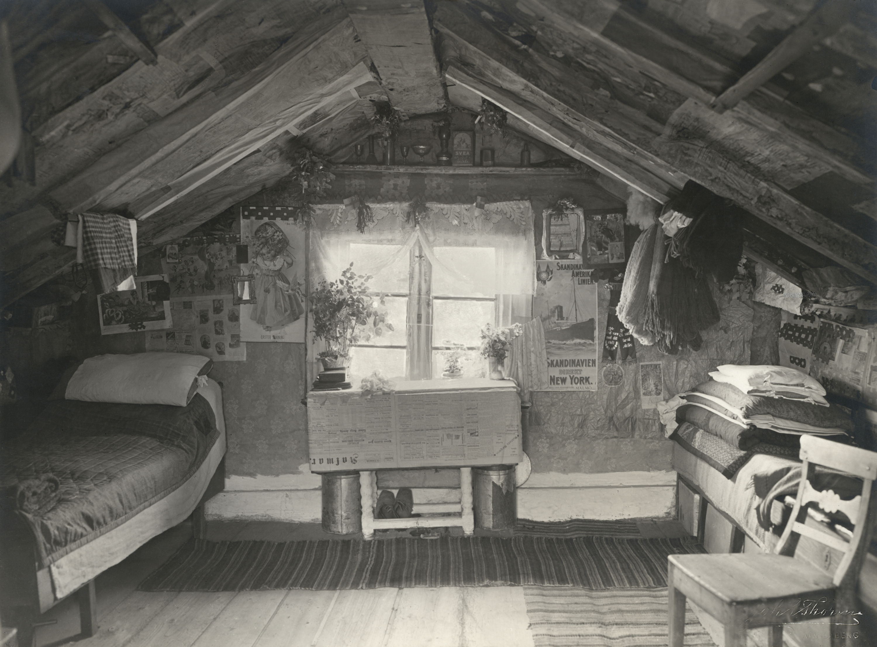 Interiör av backstuga. Småland, Kalmar län, Södra Möre härad. Torsås socken, Linnabacken. Affisch för Skandinaviska Amerikalinjen på väggen.